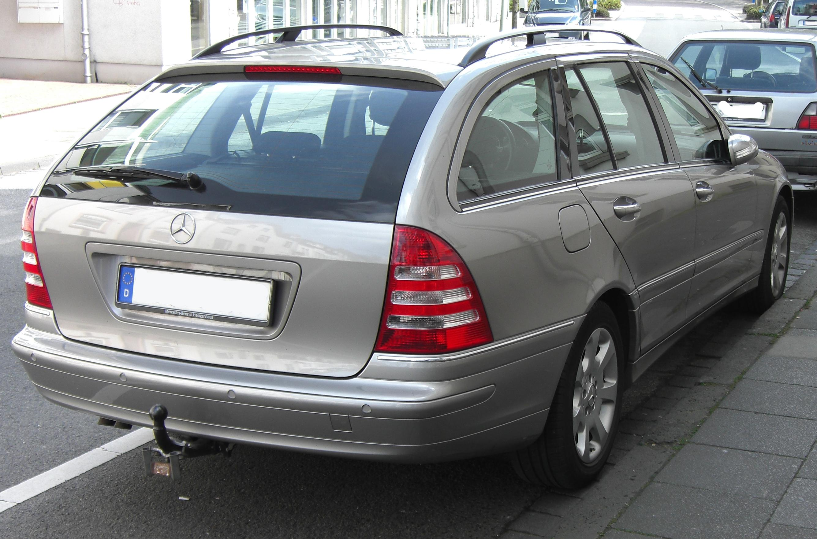 Mercedes C-Klasse T-Modell